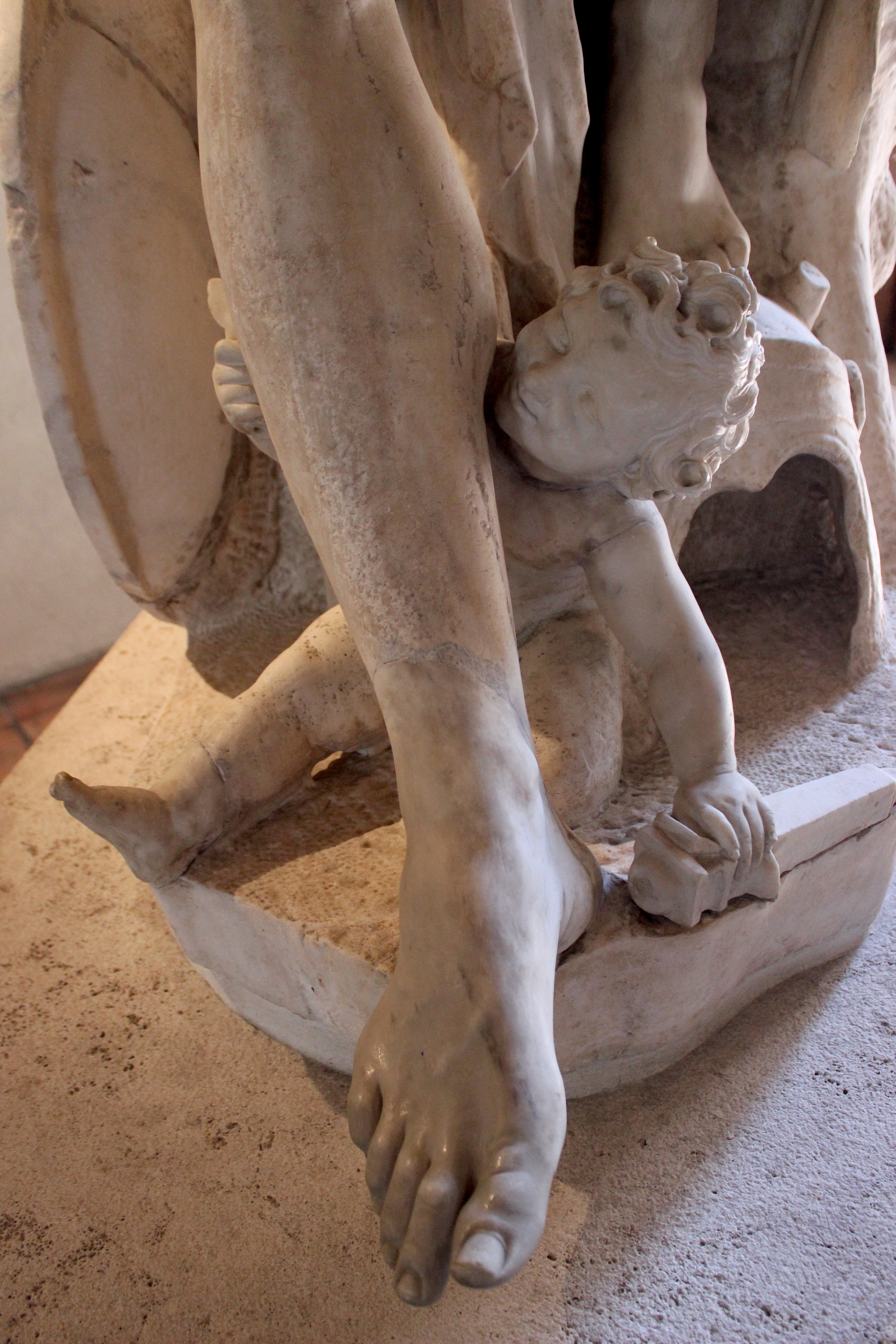 Roma, Palazzo Altemps. Ares Ludovisi.